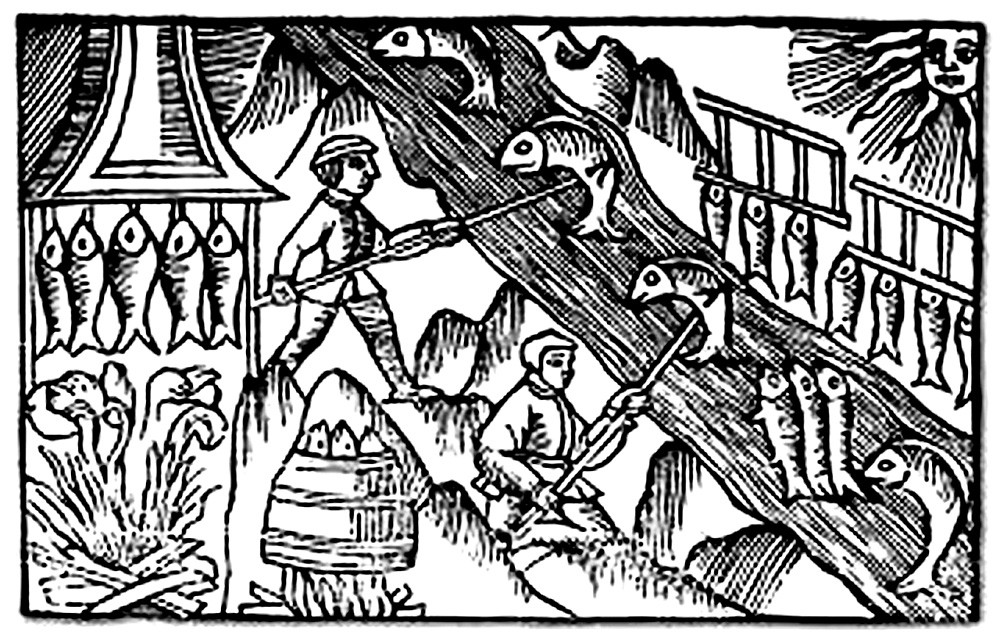 Saumons gravure médiévale